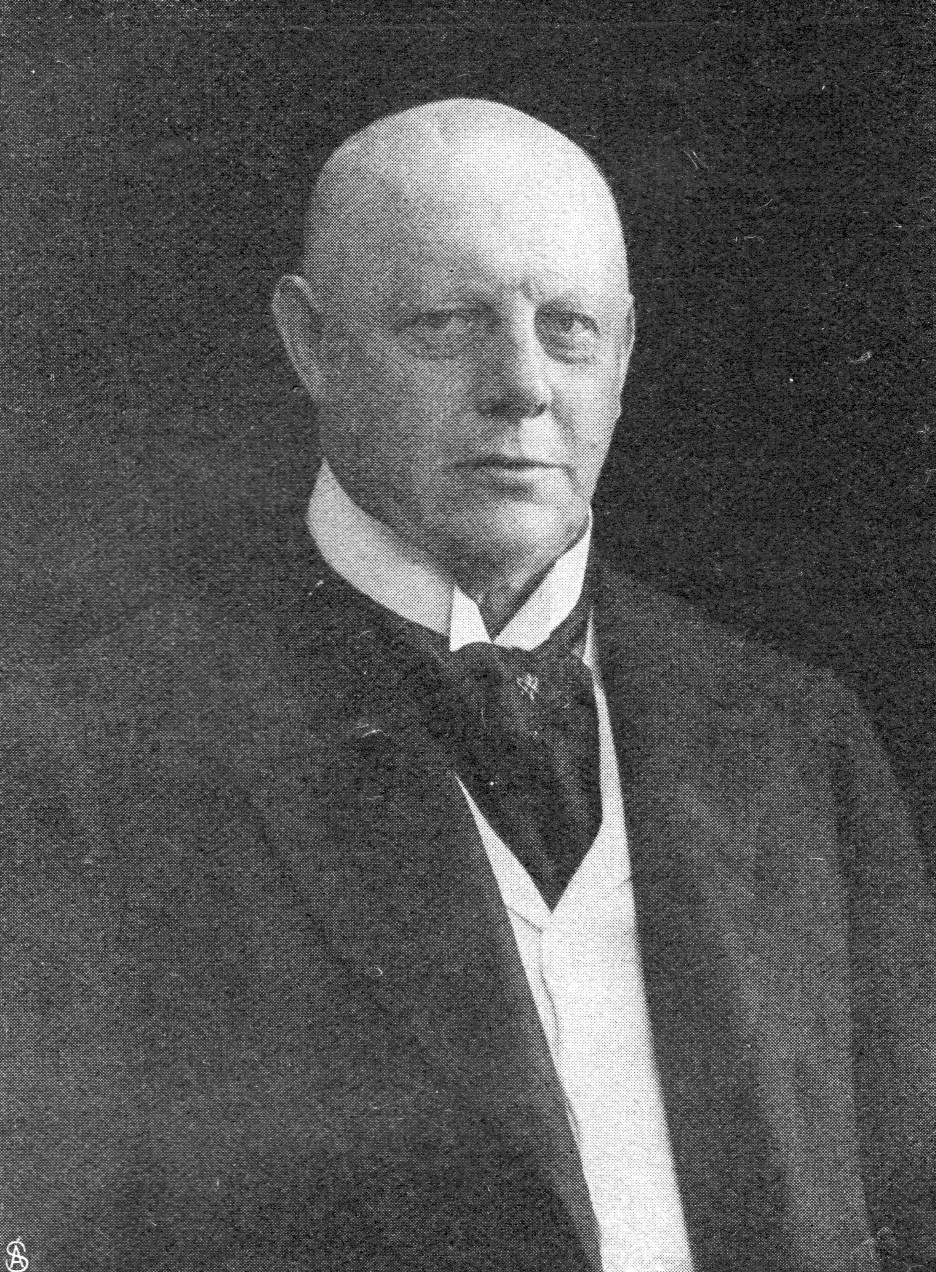 Friedrich von Moltke, broer van de bekendere veldmaarschalk, Helmuth von Moltke